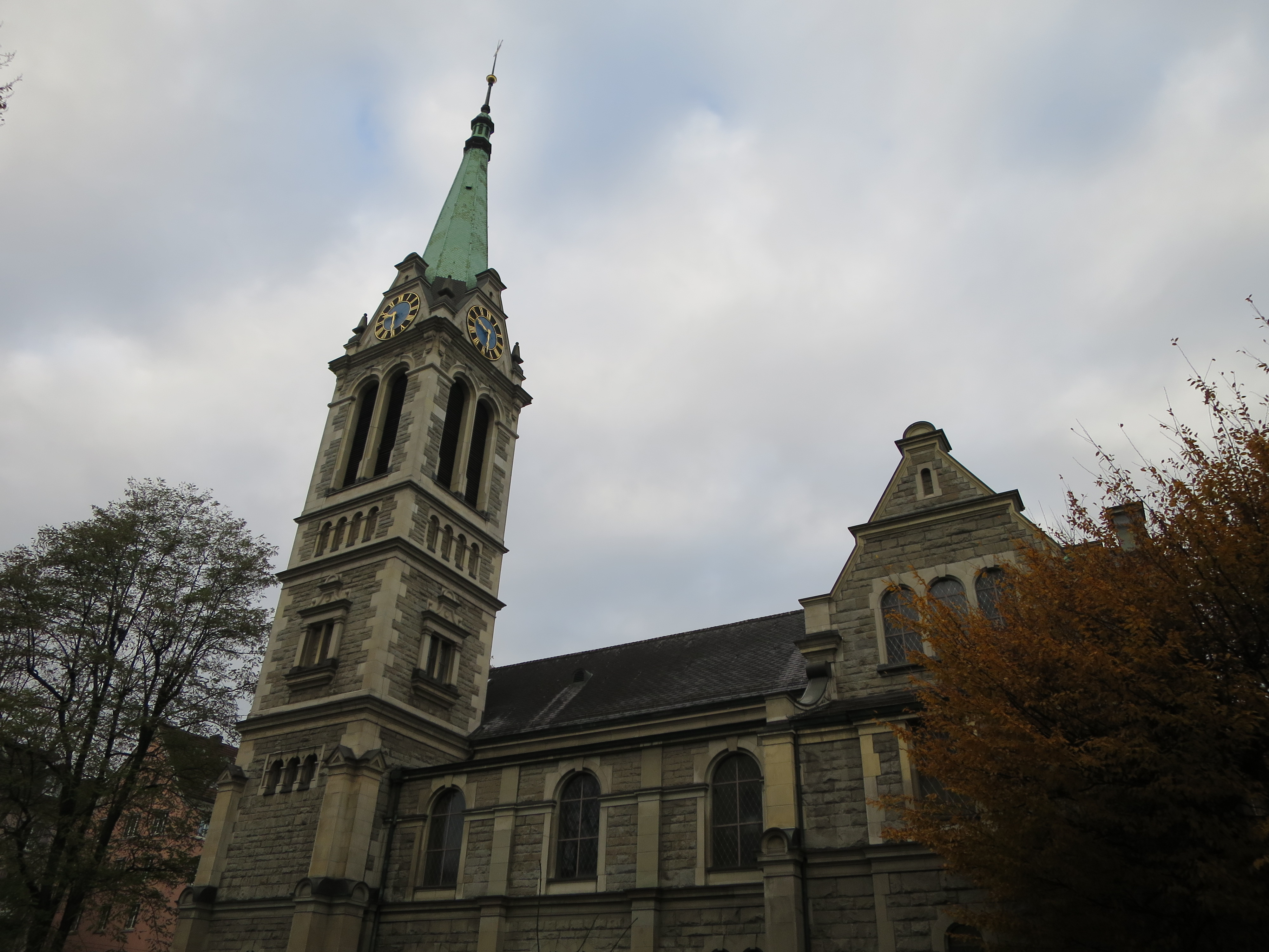 Reformierte Johanneskirche Zürich-Industriequartier: Ansicht von Osten